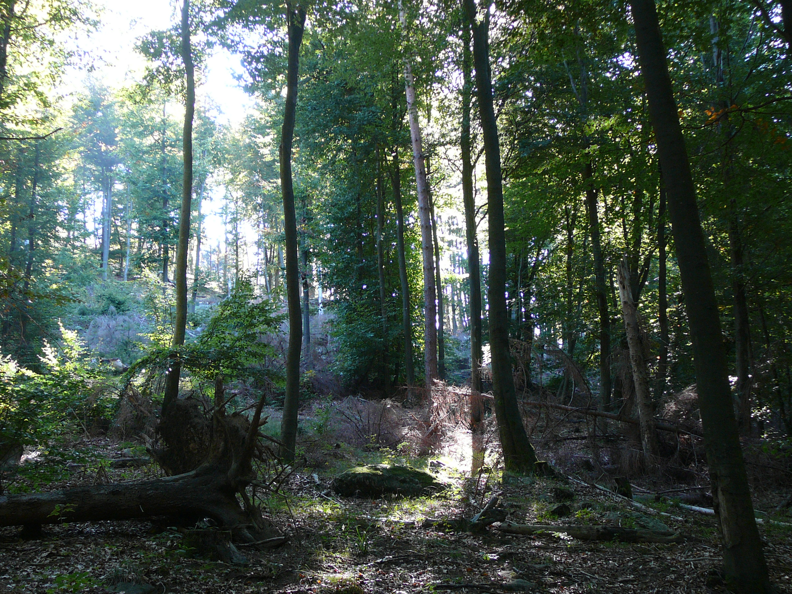 Biosphärenreservat Pfälzerwald-Nordvogesen: Kernzone „Quellgebiet der Wieslauter“